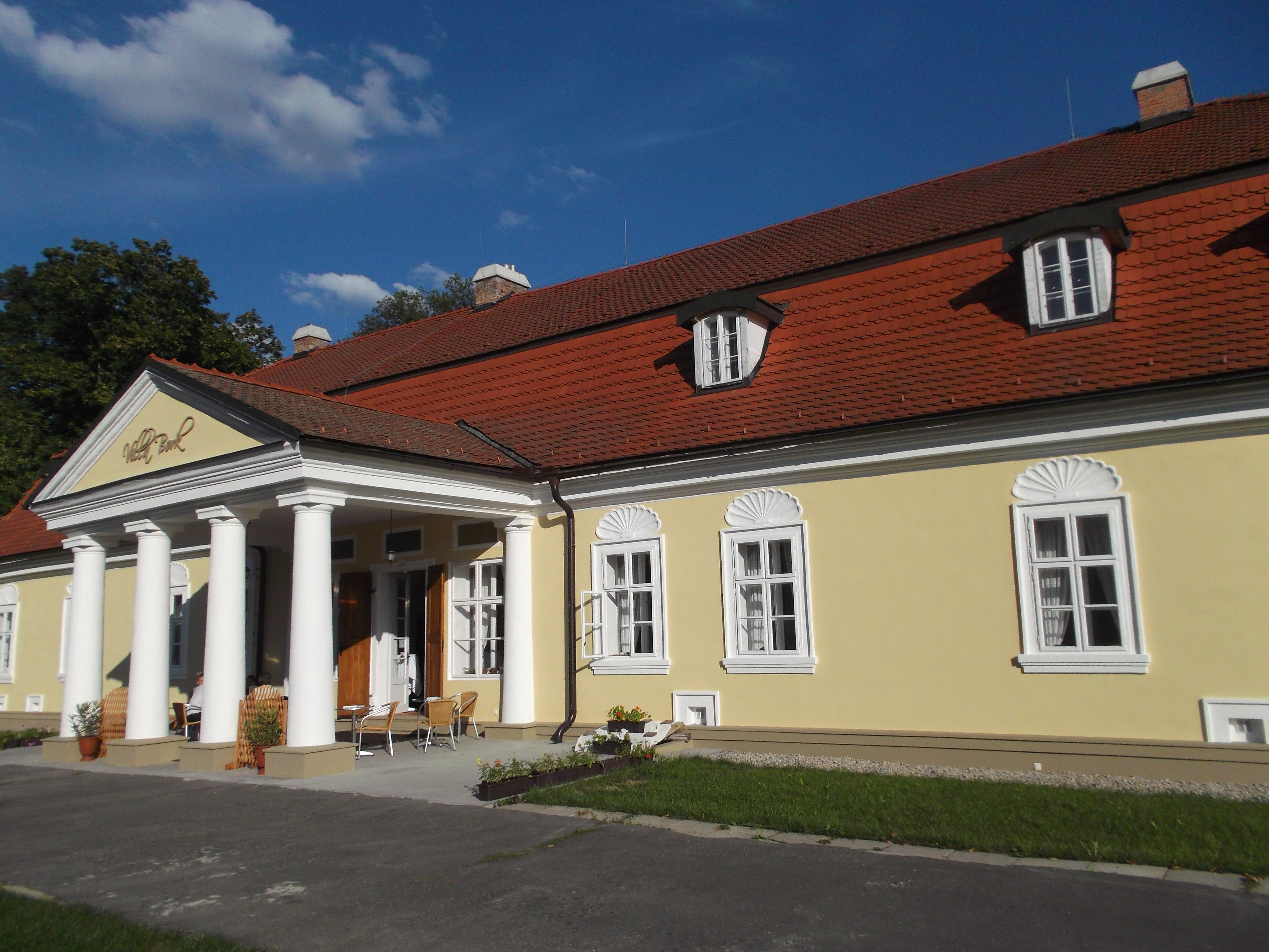 Kaštieľ